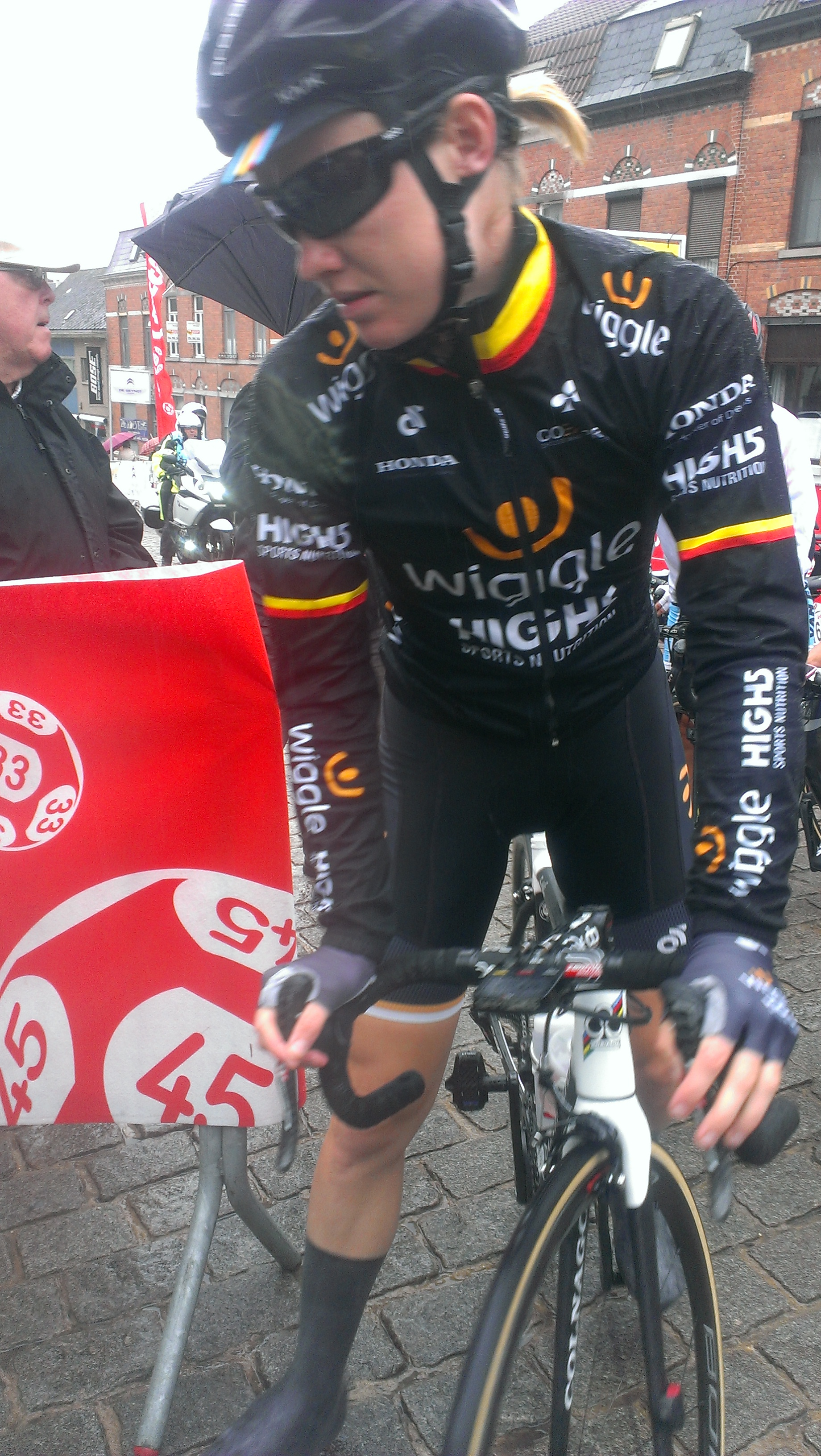 Start van de 3e en laatste etappe van de Lotto Belgium Tour 2017 in Geraardsbergen.